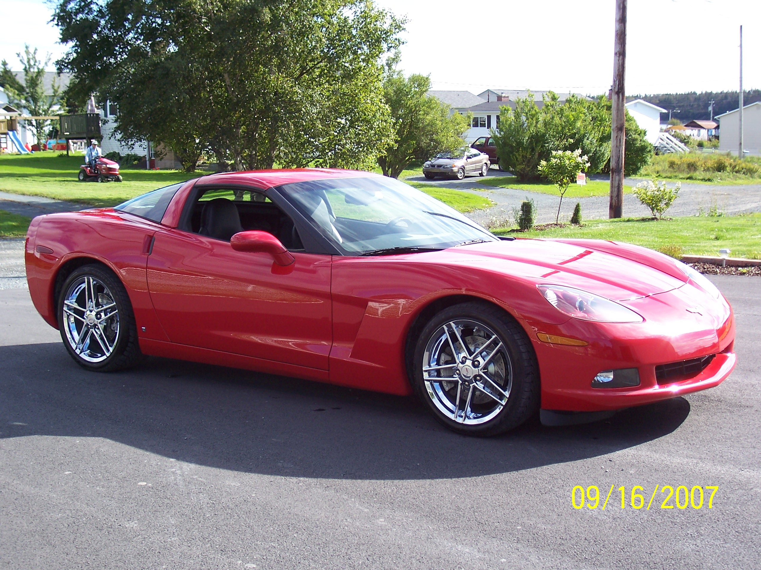 2006 Chevrolet Corvette C6 coupe. Srpskohrvatski / српскохрватски: 2006. Chevrolet Corvette C6 Coupe.